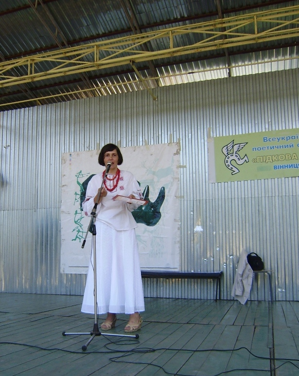 Валентина Сторожук на V Всеукраїнськом фестивалі "Підкова Пегаса", Вінниця, 2012